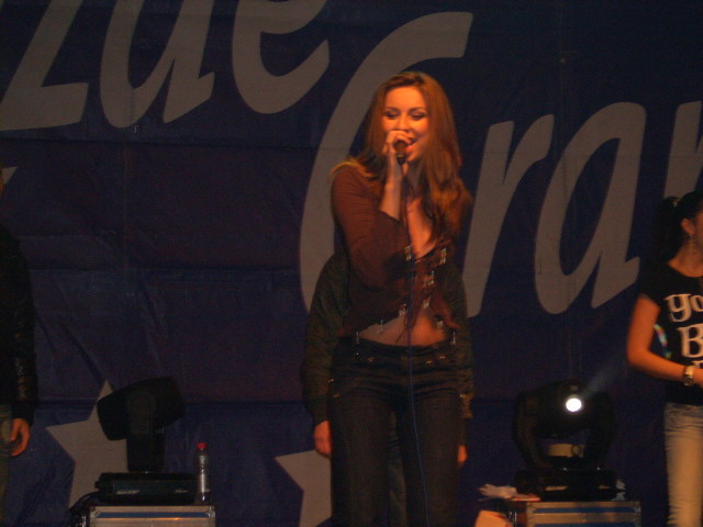 Радмила Манојловић на наступу 2007. (аутор слике Mstudiodf).